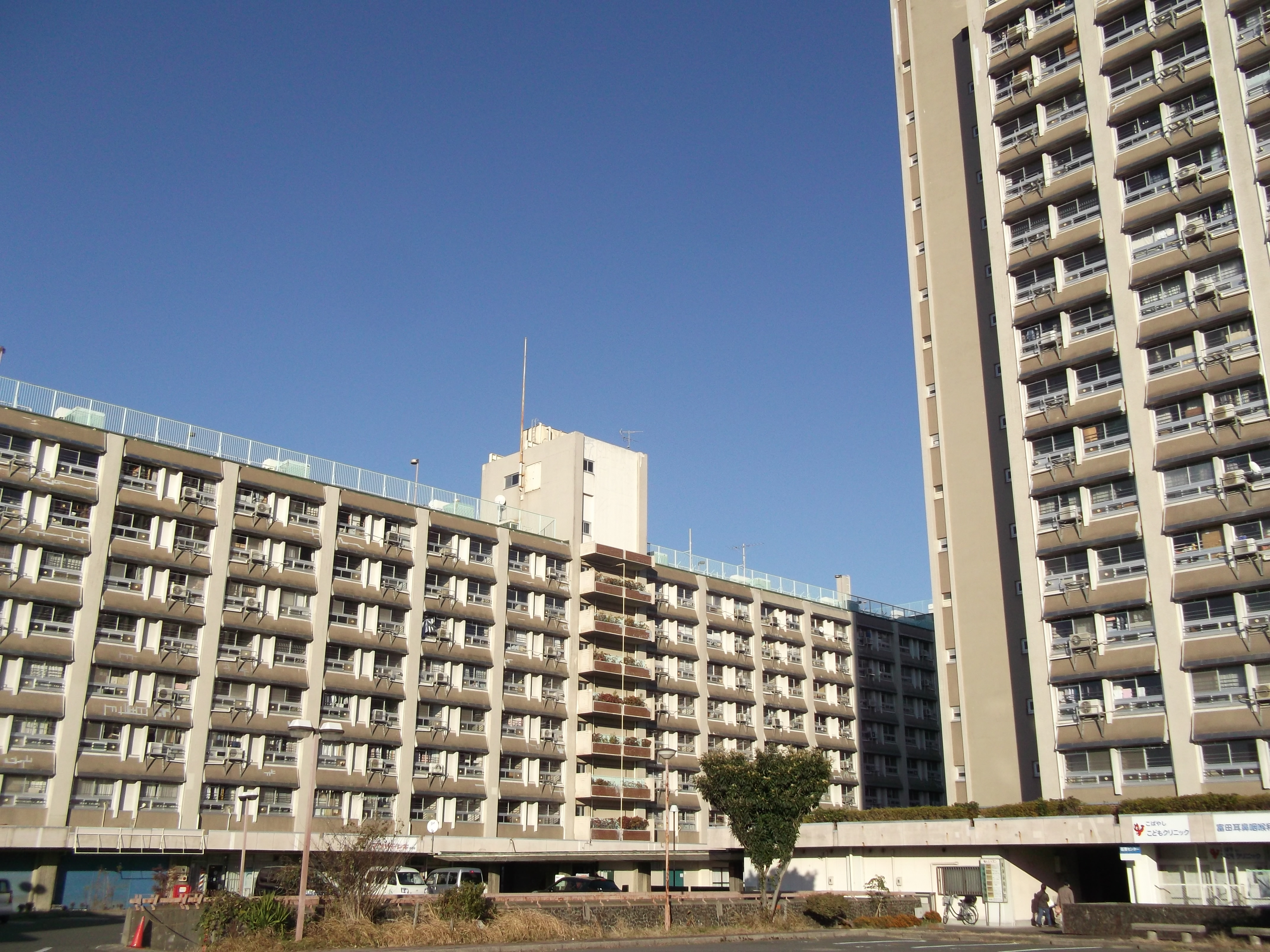 名古屋市西区又穂町にあるUR又穂住宅を南西側から写す